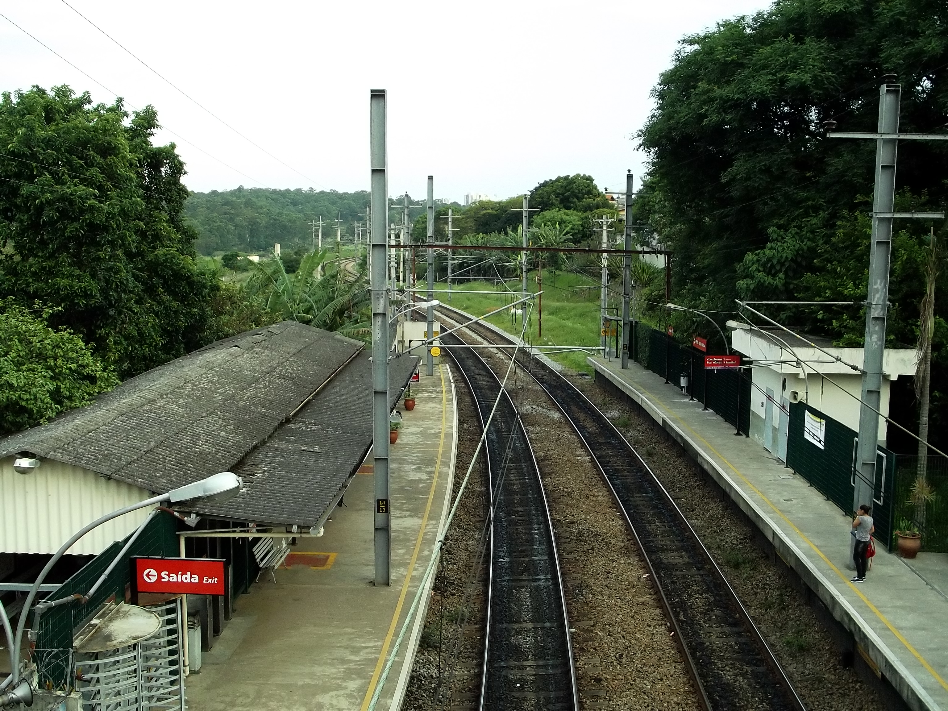 arquitetura viária